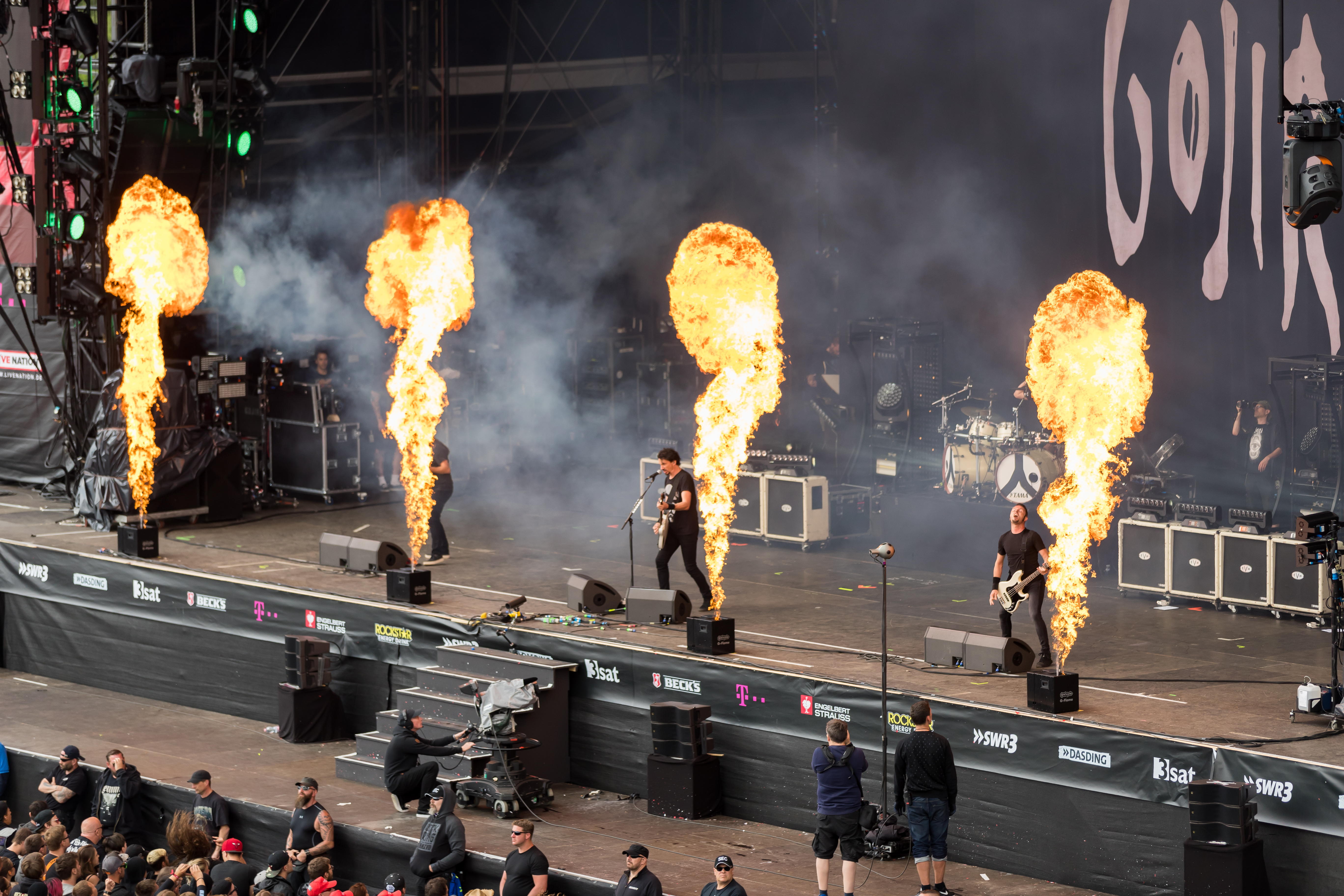 Gojira during Rock am Ring at Nürburgring, Nürburg, Rheinland Pfalz, Germany on 2017-06-04, Photo: Sven Mandel